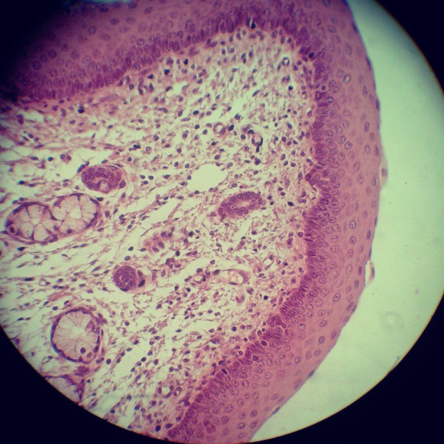 Tecido Epitelial Estratificado Pavimentoso não queratinizado E Tecido Conjuntivo de Esôfago de Mus musculus ao M.O. 400x